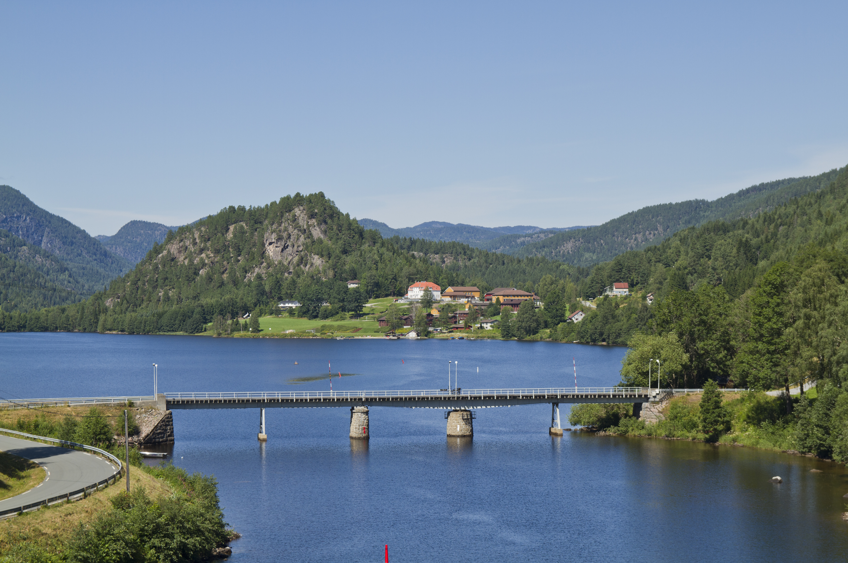 Kvitseid